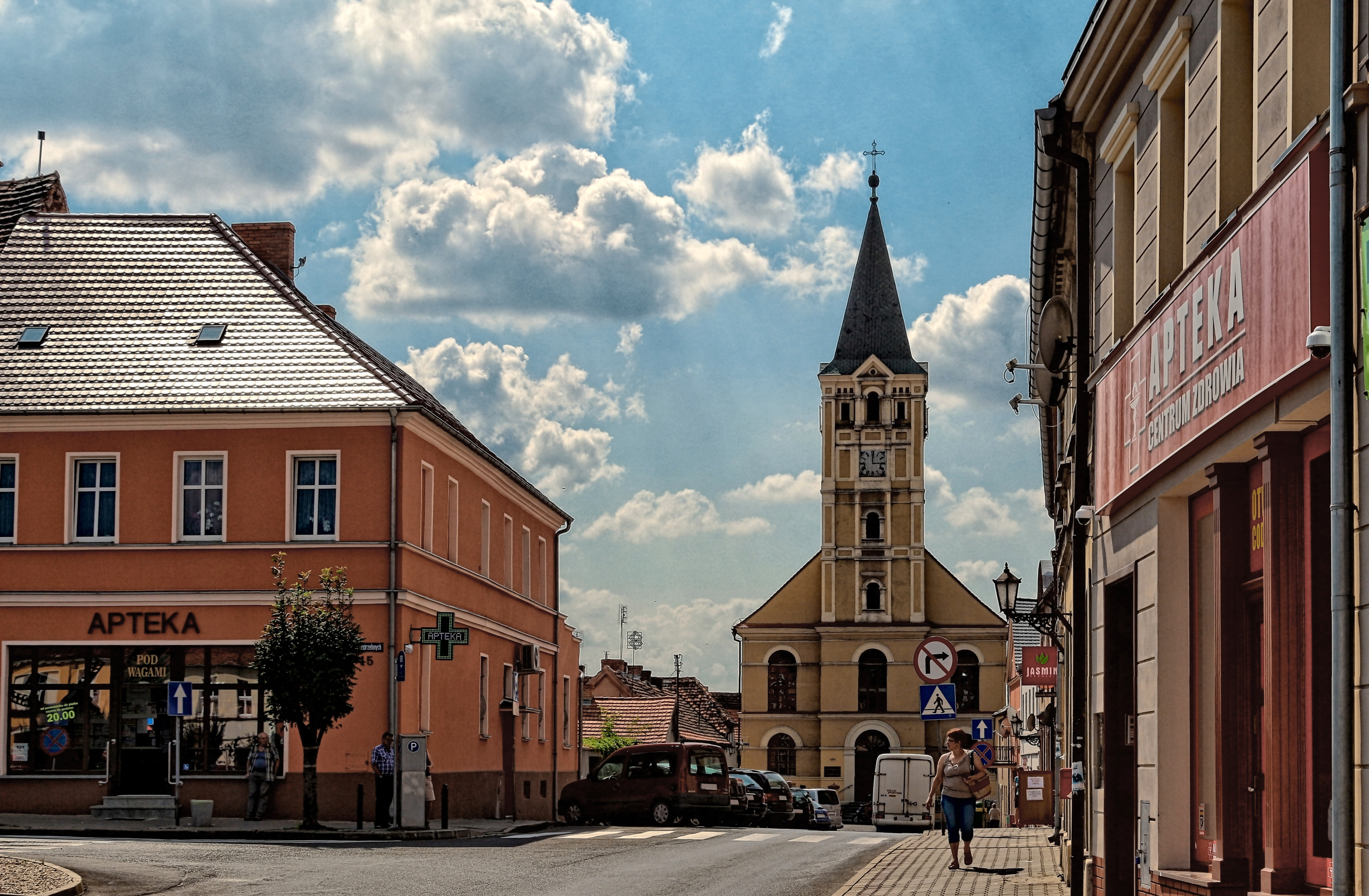 Śmigiel, kościół św. Stanisława Kostki